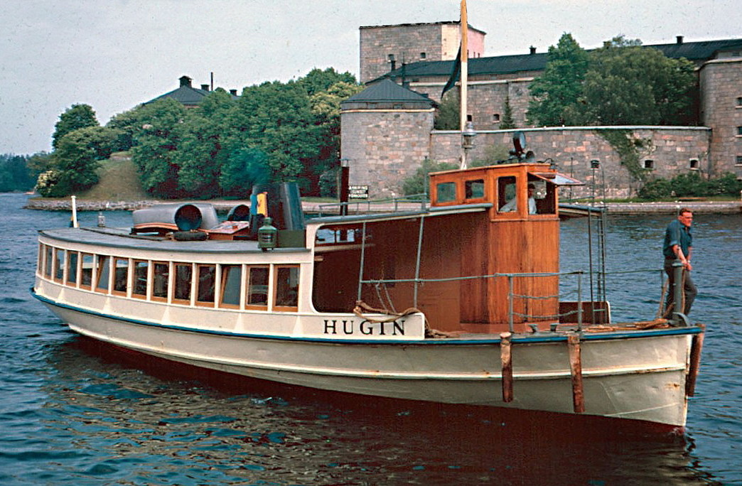 M/S Hugin utanför Vaxholms fästning